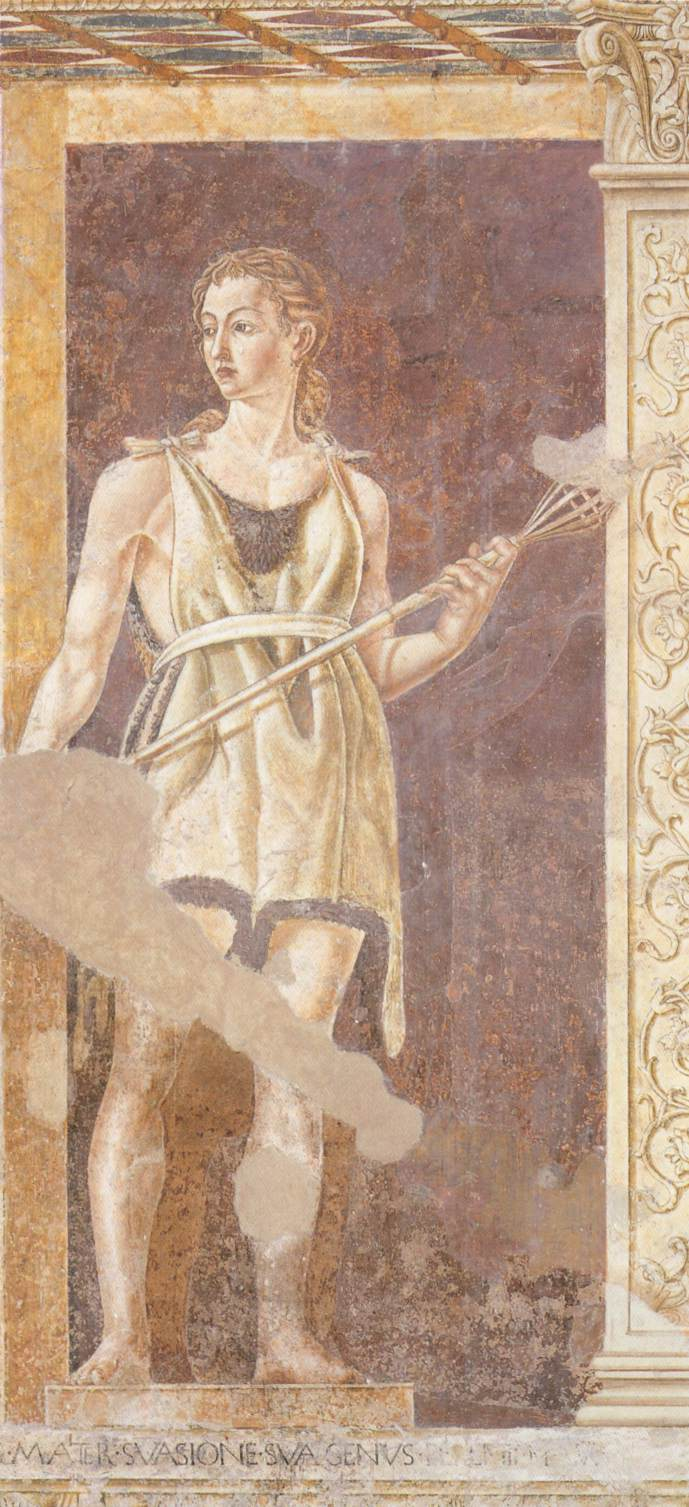 ANDREA DEL CASTAGNO Eve Fresco Villa Carducci, Soffiano (Florence)